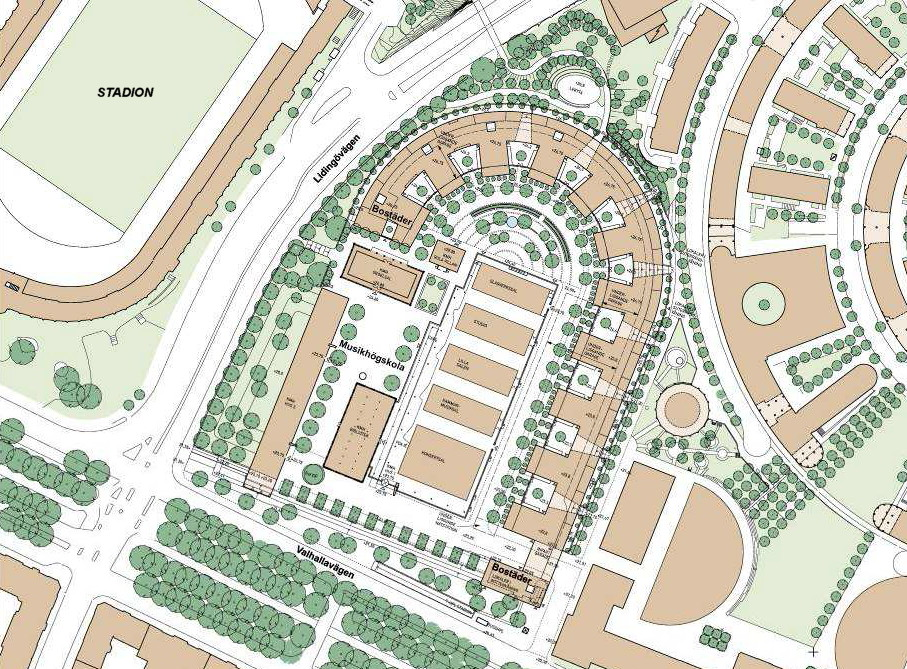 Svea Fanfar etapp 3 - Veidekke Bostad AB och Selvaag Bolig AS